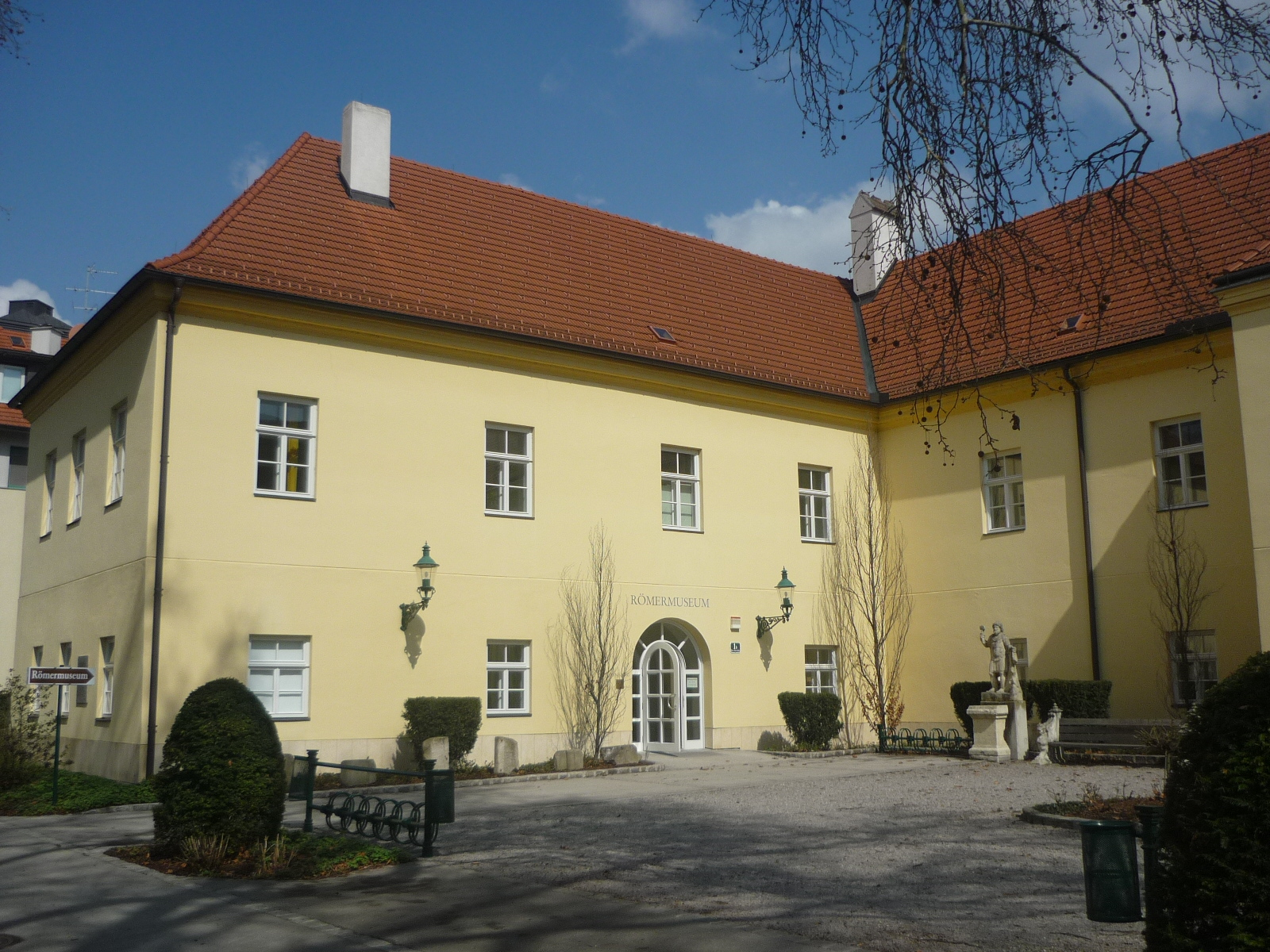 Das römische Museum im Marc Aurel-Park in Tulln